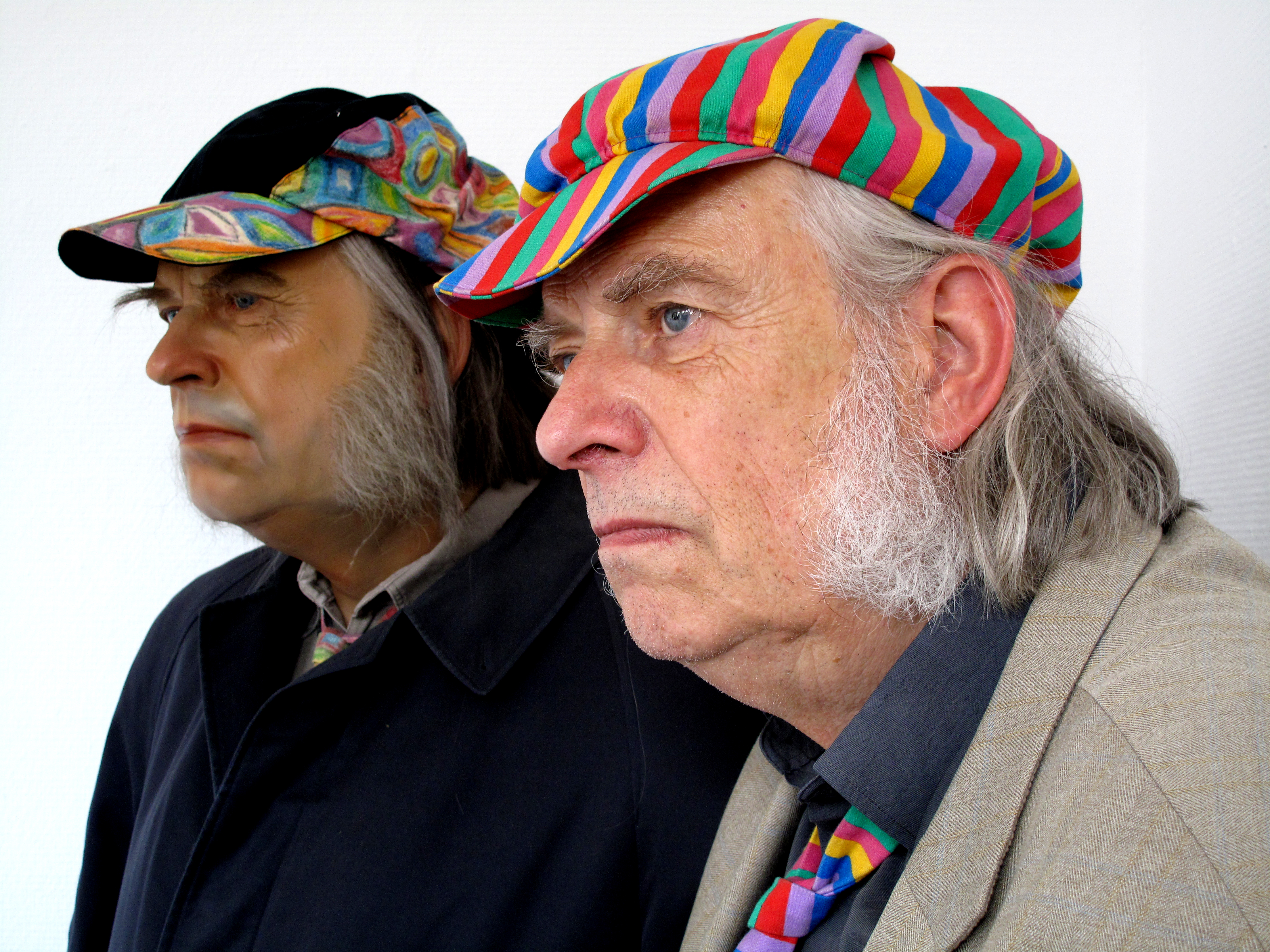 Künstlerporträt entstanden im Kunstmuseum Gelsenkirchen